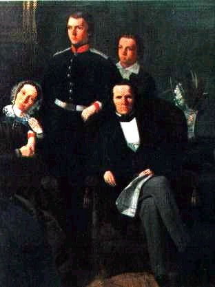 Jakob Lienau mit Frau und zwei Söhnen